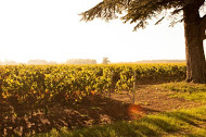 La vigne aux alentours de Beyzac